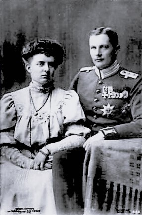 Eitel Friedrich von Preußen mit Sophie Charlotte von Oldenburg. Druckerei: Rothophot AG.